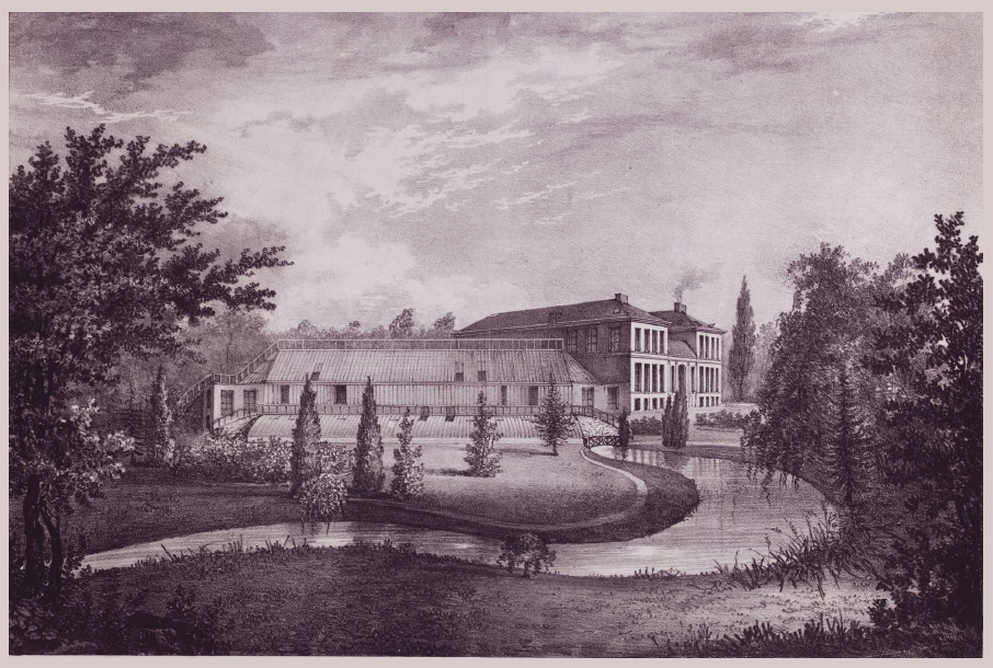 Etablissement Géographique de Bruxelles (1830-1880) gravure ancienne